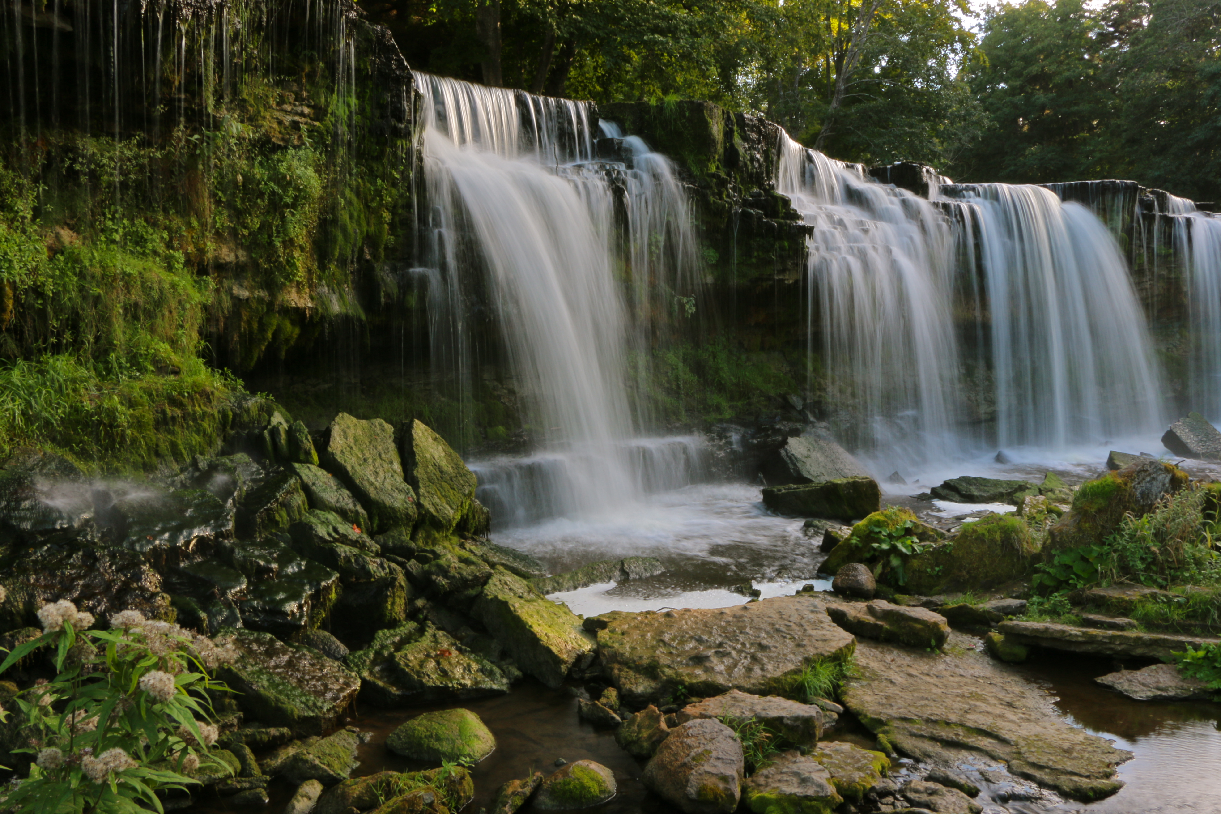 Keila-Joa vaade, Harjumaa